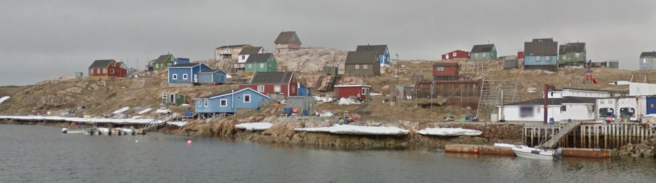 Akunnaaq